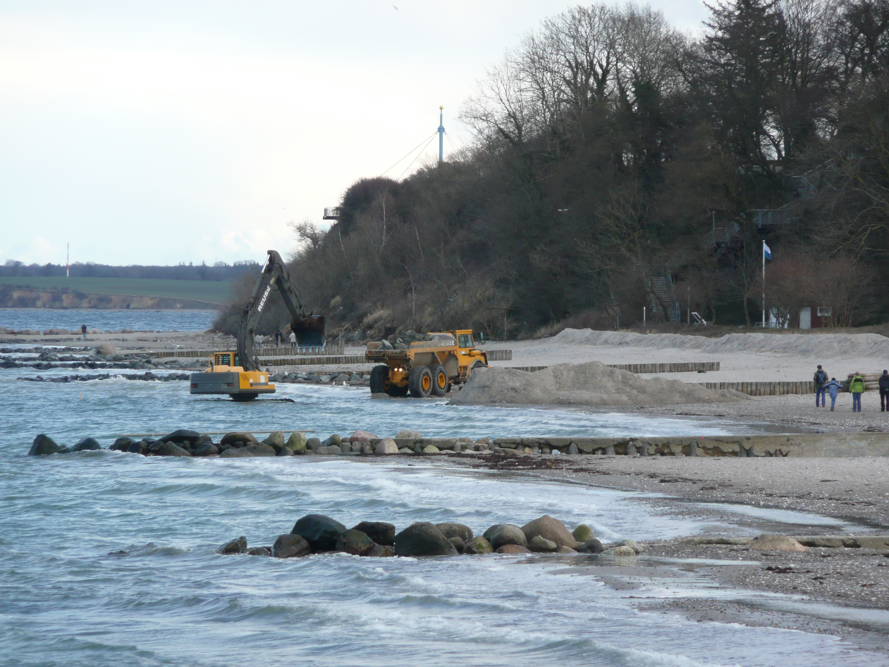 Küstenschutz in Hohwacht